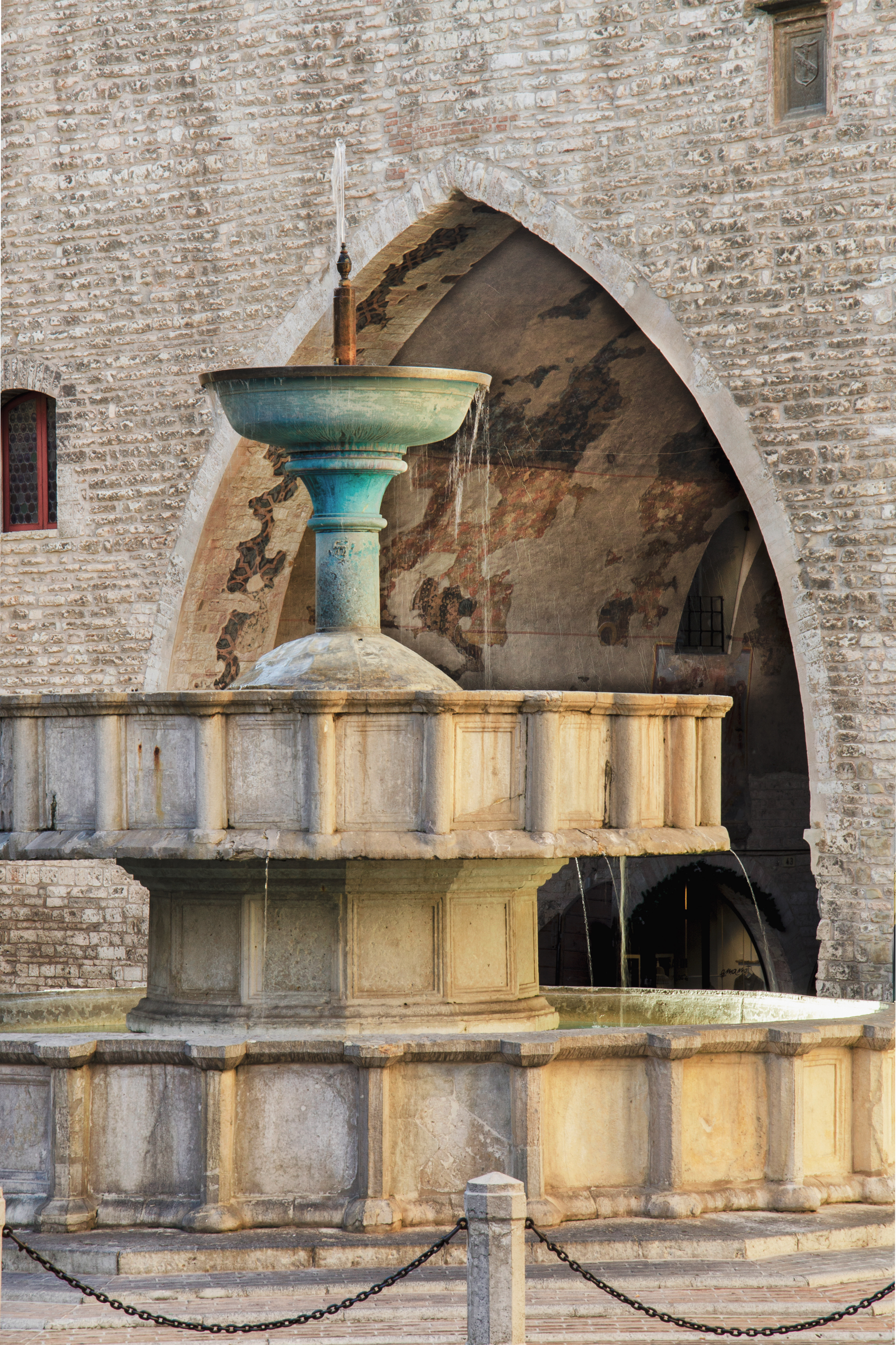 Fontana Sturinalto This is a photo of a monument which is part of cultural heritage of Italy.